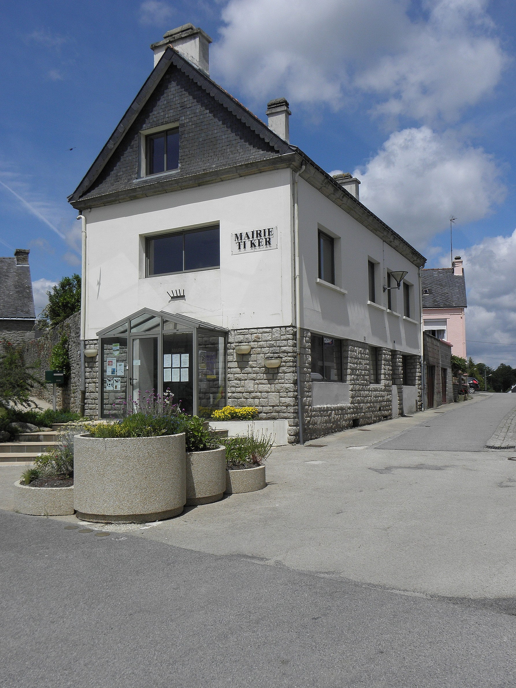 Mairie de Le Croisty (56).